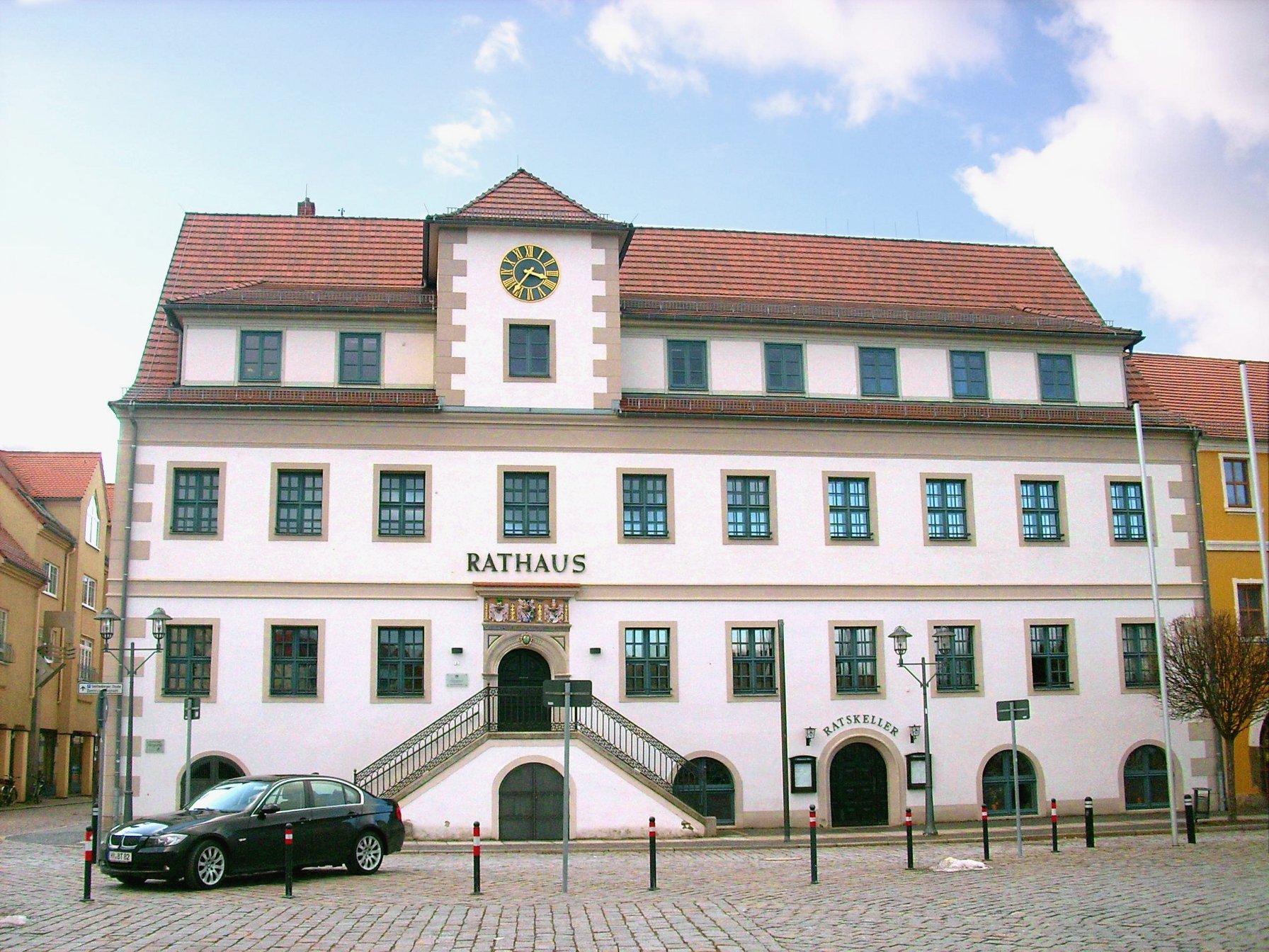 Altes Rathaus, Markt 1 in Hoyerswerda